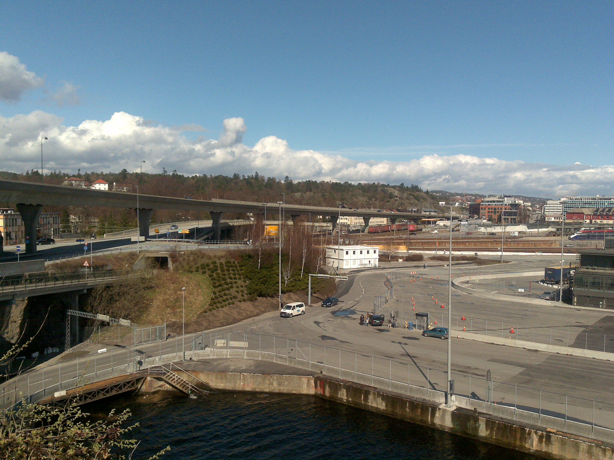 Vesterbrua, Kristiansand, Norway